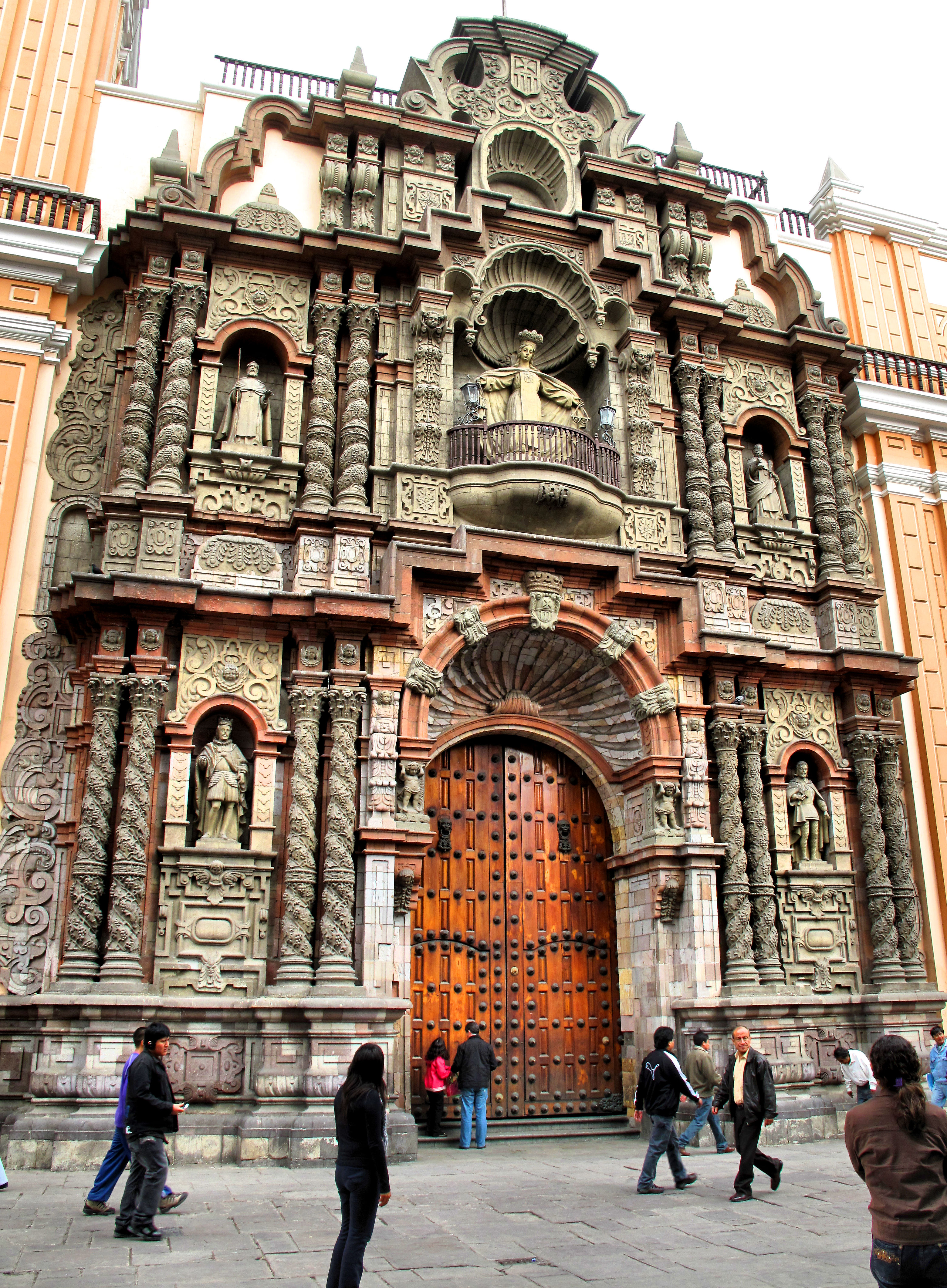 Iglesia de la Merced